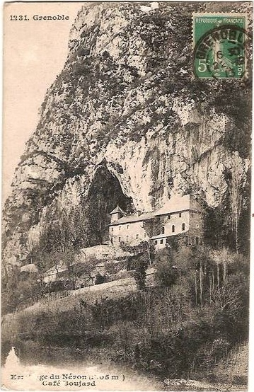 Carte postale du château de l'Ermitage à Saint-Martin-le-Vinoux (antérieur à 1913)